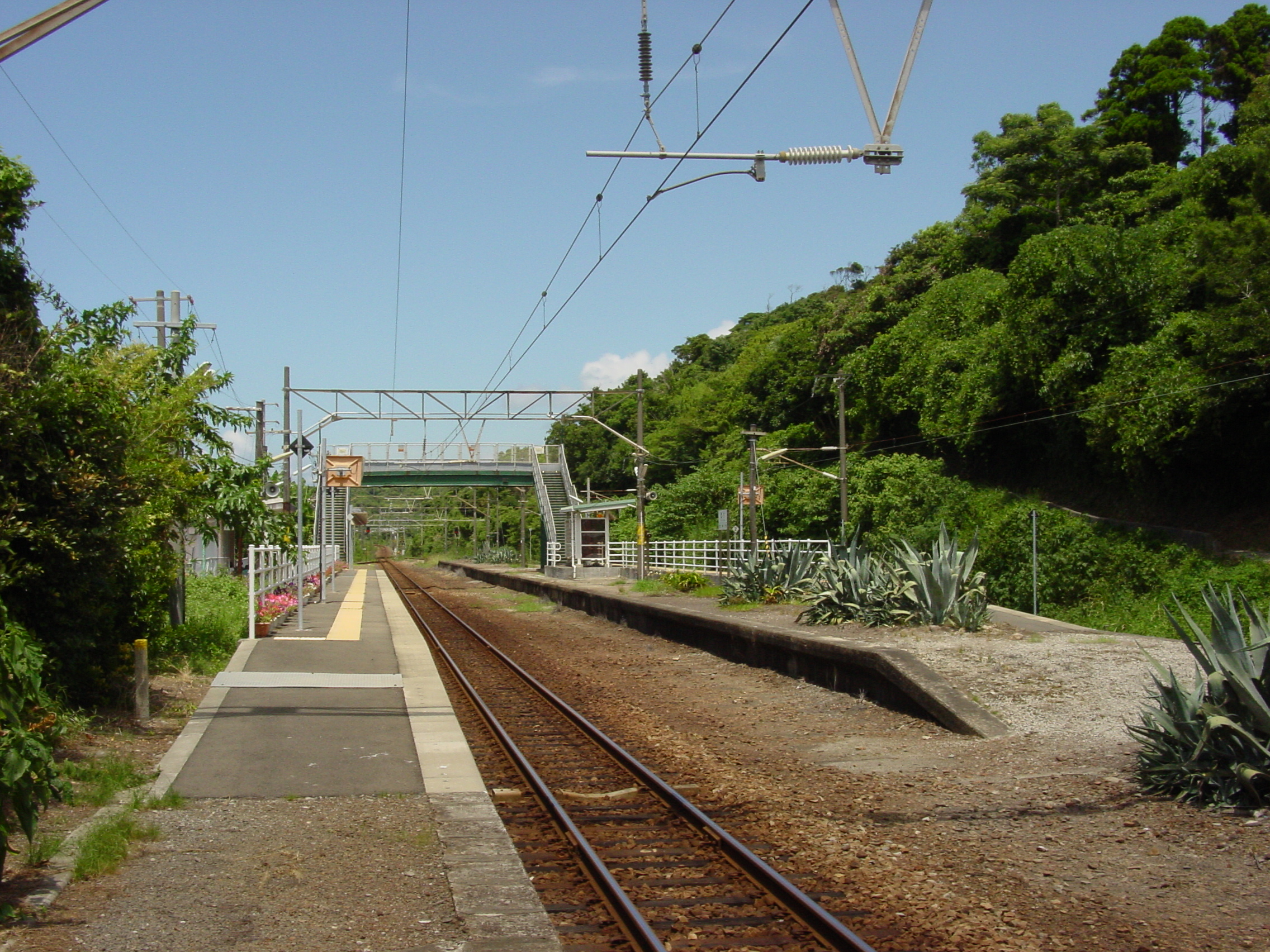 肥薩おれんじ鉄道西方駅